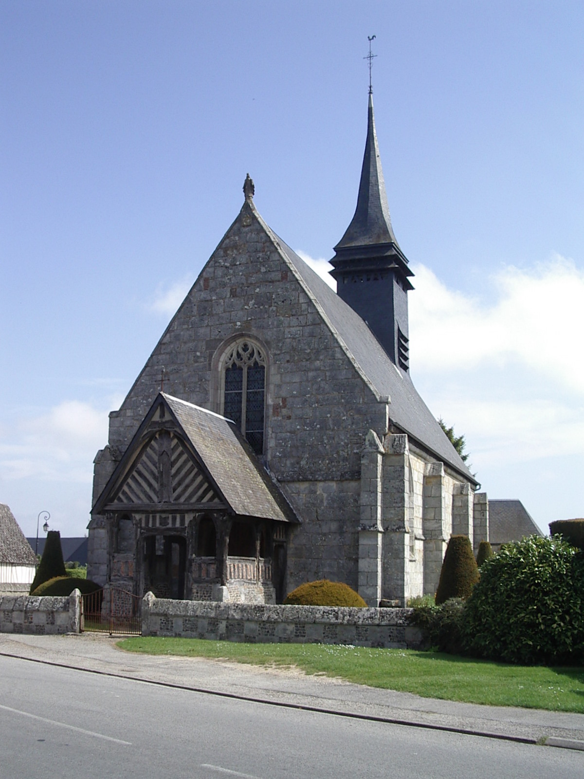 Vorhalle und Giebel der Kirche in Joquerets-de-Livret, Eure, Normandie, Frankreich.